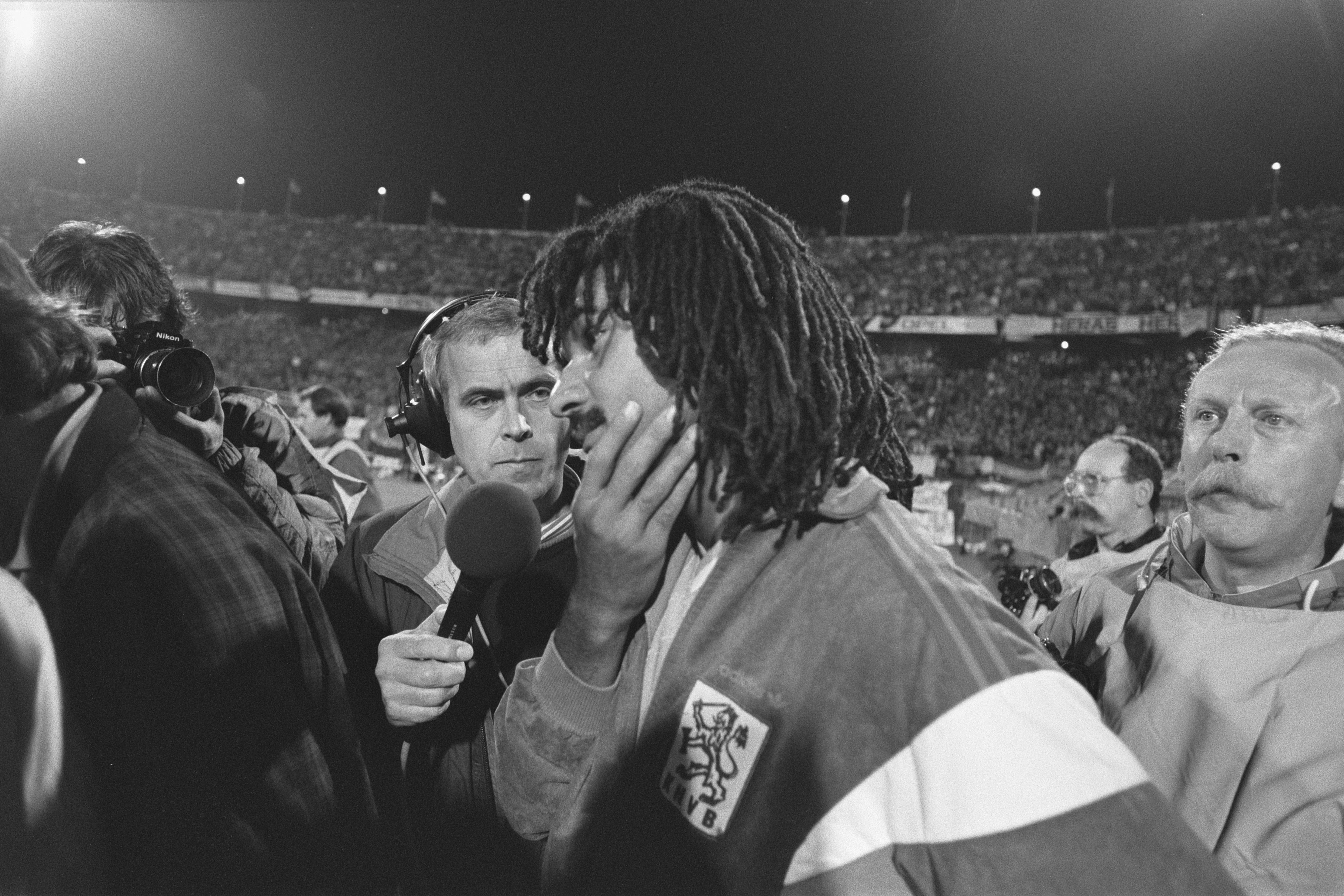 Collectie / Archief : Fotocollectie Anefo Reportage / Serie : [ onbekend ] Beschrijving : EK kwalificatie interland Nederland tegen Cyprus 8-0; wedstrijd uur gestaakt na bommetje, Ruud Gullit Datum : 28 oktober 1987 Locatie : Rotterdam, Zuid-Holland Trefwoorden : interviews, sport, voetbal Persoonsnaam : Gullit Ruud, Napel Evert ten Fotograaf : Bogaerts, Rob / Anefo Auteursrechthebbende : Nationaal Archief Materiaalsoort : Negatief (zwart/wit) Nummer archiefinventaris : bekijk toegang 2.24.01.05 Bestanddeelnummer : 934-1164